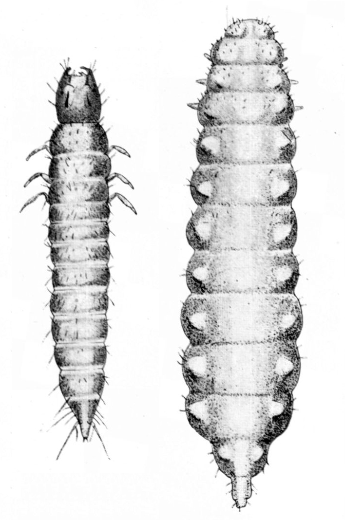 Les deux types larvaires d'Aleochara bilineata Gyll. (d'après Wadsworth). Figure de gauche —Première larve, face dorsale, (x55). Stade campodéiforme. Figure de droite —Deuxième larve, face dorsale, (x15). Stade cruciforme.